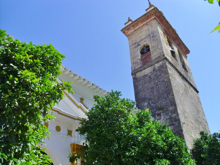 Exterior de la Iglesia de Nuestra Señora de las Huertas, en La Puebla de los Infantes, Sevilla, España.